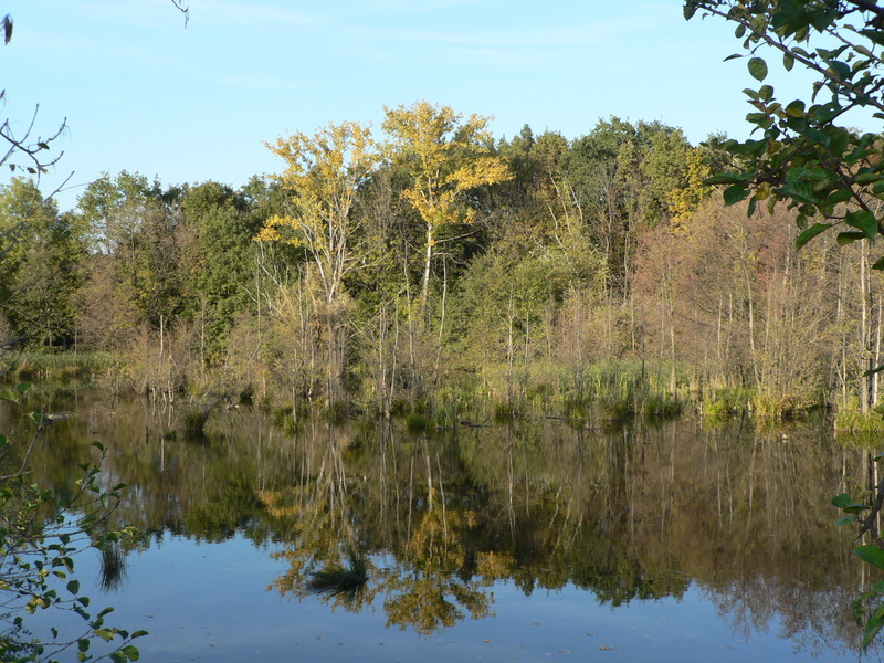 Přírodní rezervace V Pískovně, Dolní Počernice, Hostavice